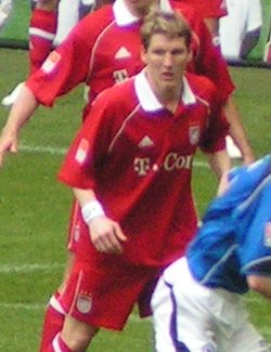 Bastian Schweinsteiger defending while a corner from Arminia Bielefeld